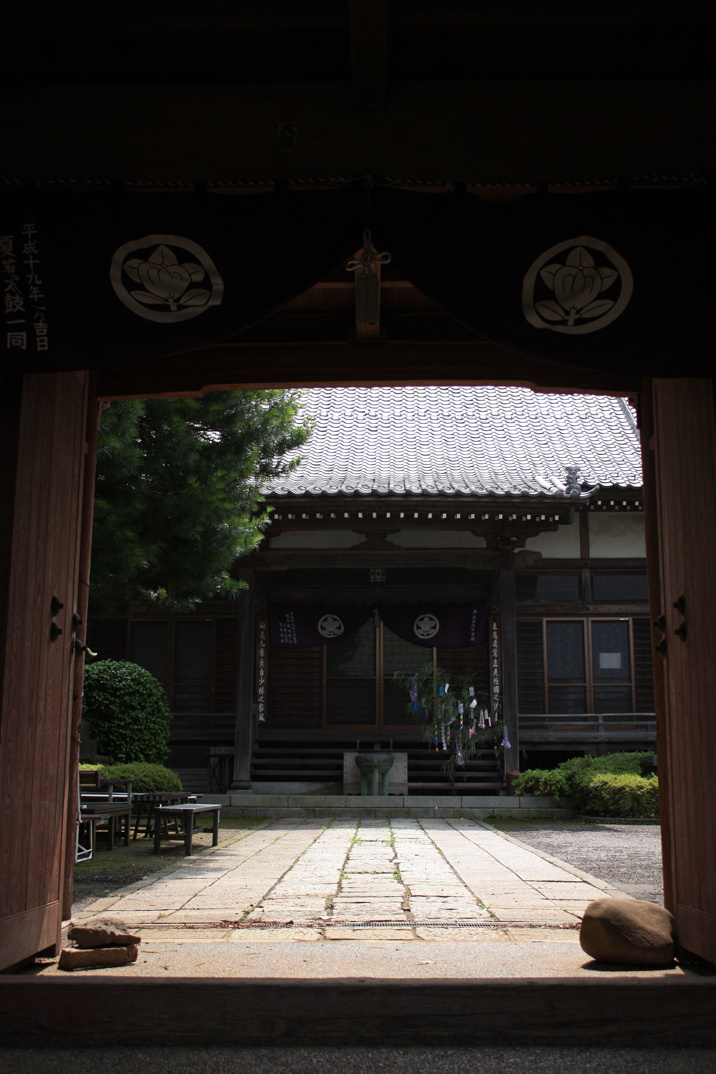 修廣寺